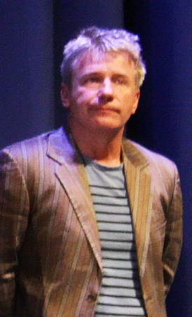 Jörg Schüttauf auf dem Münchner Filmfestival 2010. Premiere des Films Kongo.